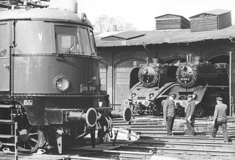 Halle/Saale, historische Dampfloks ADN-ZB Deutsche Demokratische Republik 15.6.1988 Alte Dampfloks wohlbehütet (Serie - 3 Motive) . In einem Lokomotivschuppen der Deutschen Reichsbahn in Halle stehen ausgediente Dampfloks, die nur noch zu Sonderfahrten eingesetzt werden. Sie befinden sich in persönlicher Wartung und Pflege von mehreren Eisenbahnern. Die Lokomotive E 18, in den 30er und 40er Jahren die schnellste Elektrolok der Welt, fuhr einst vorrangig im süddeutschen Raum und auf den Strecken München-Leipzig-Halle. -siehe auf 307 u. 309 N- Reporter: Lehmann Copyright: ADN-Zentralbild Berlin-DDR